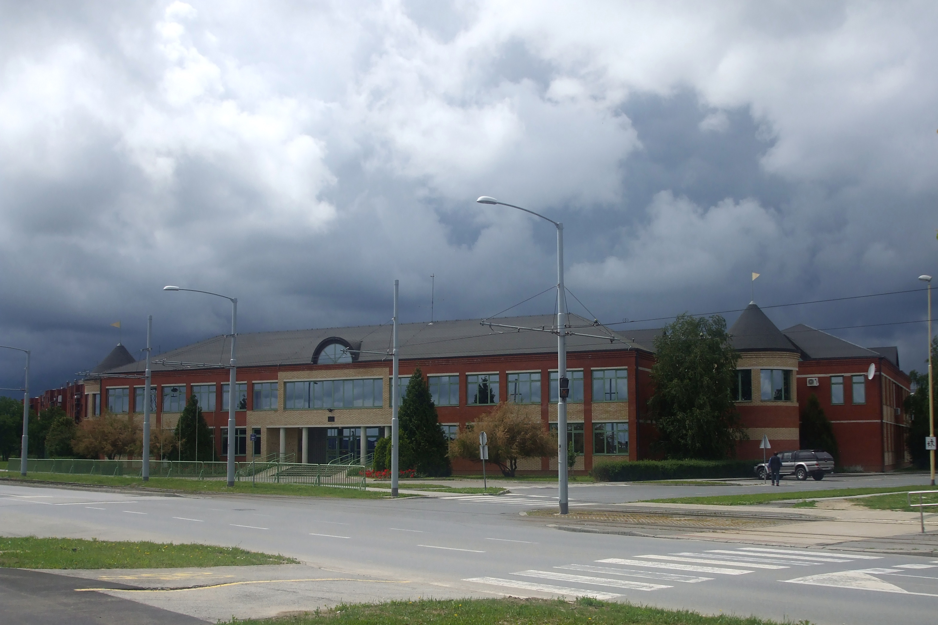 Prosvjetno-kulturni centar Mađara u Hrvatskoj u Gackoj ulici u Osijeku.